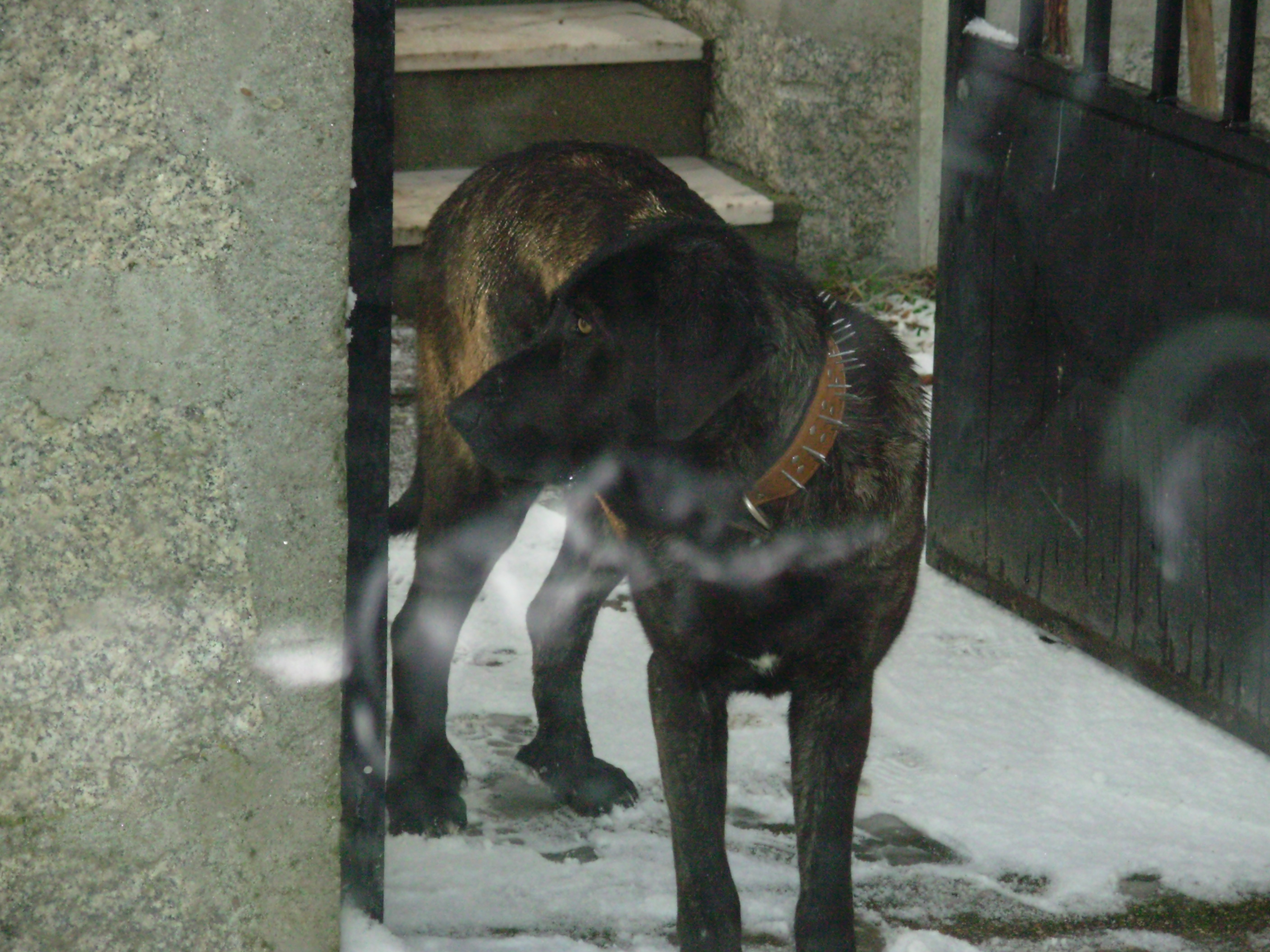 Cão de Castro Laboreiro em Entalada, Castro Laboreiro.